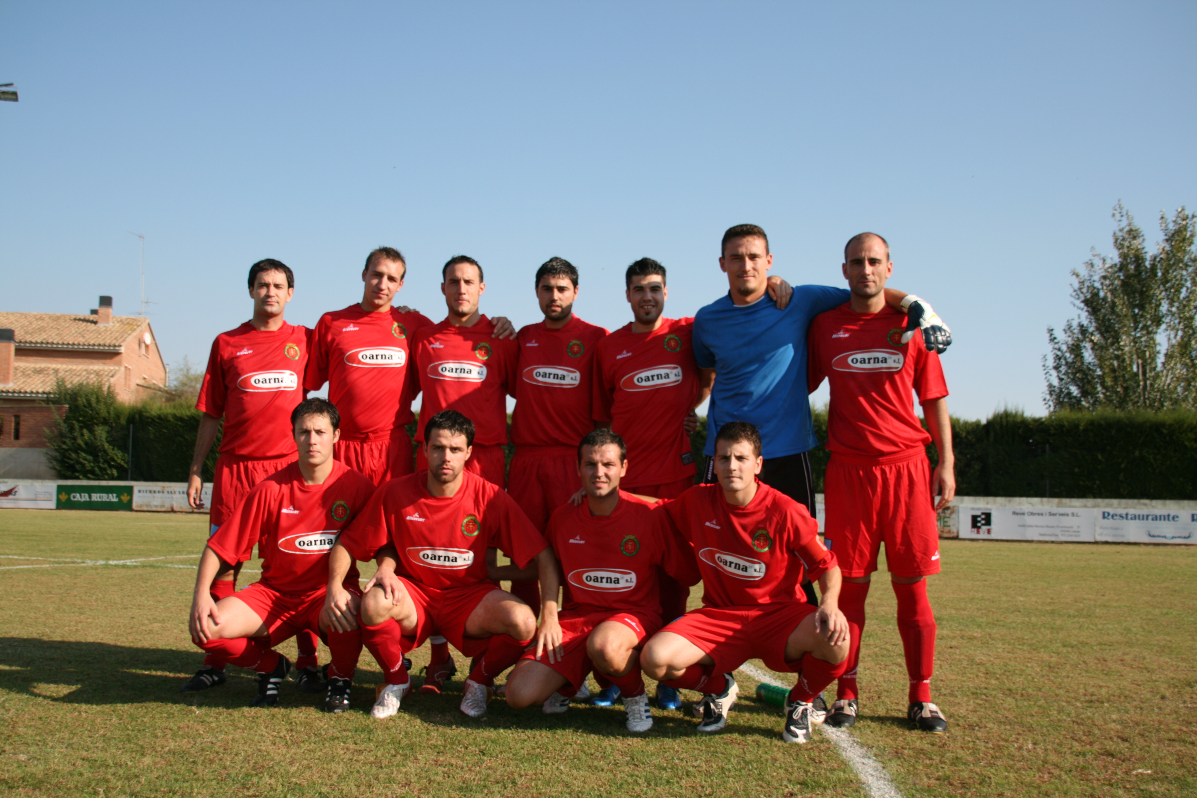 Jacetano CF